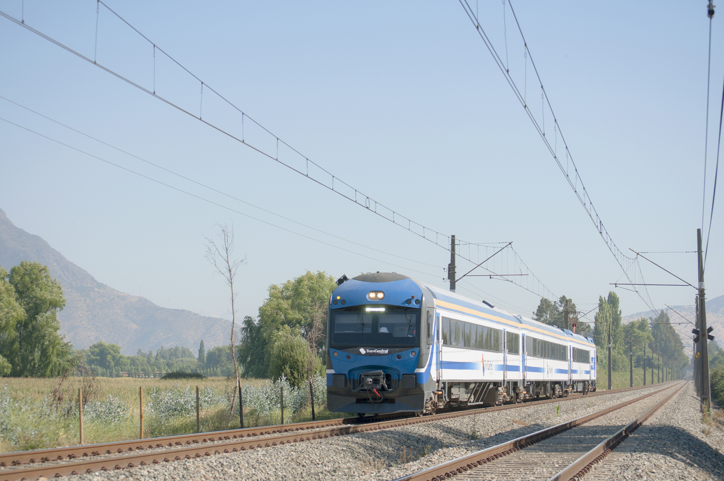 El clásico servicio, con nueva vestimenta y un remozado automotor. UTS-607 destino Alameda, en las cercanías del estero Panama, en la comuna de Paine. Diciembre, 2015